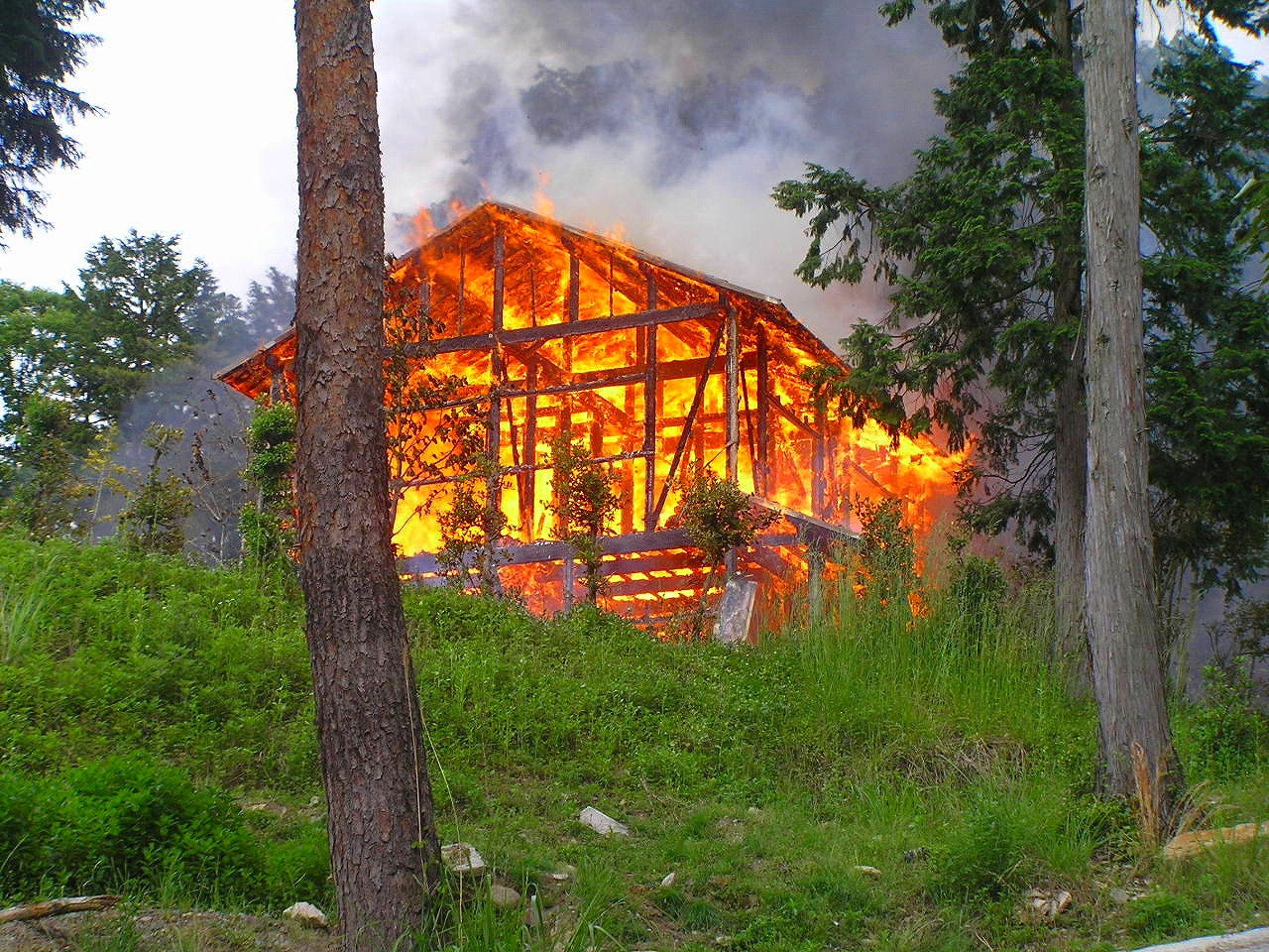 火災（かさい）は、災害の一種。火事（かじ）とも呼ばれる。建造物や山、森などが燃えることで、直接または間接に生命が危険にさらされたり、財産がその機能を果たせなくなって損失が出たりする。